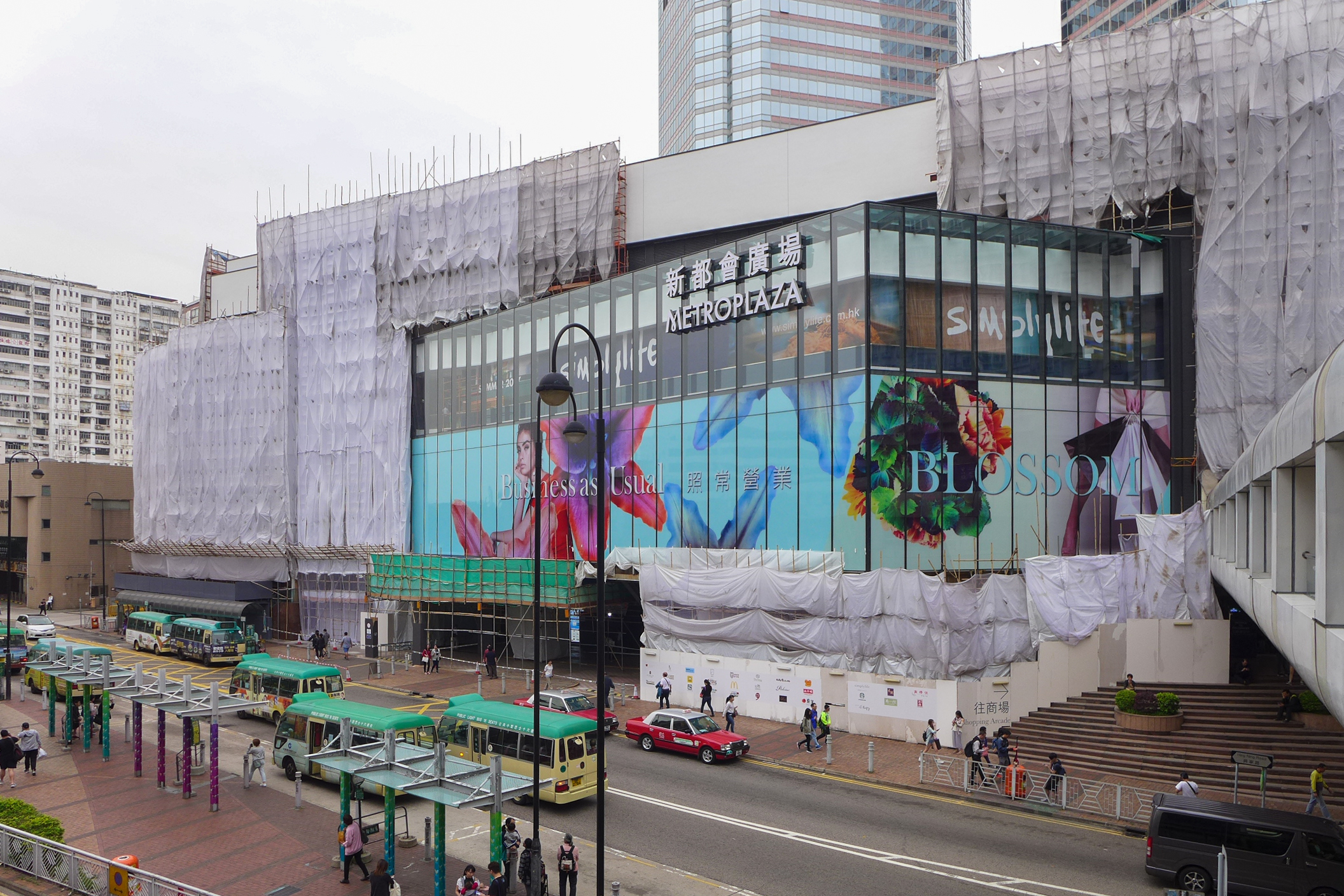 Metroplaza Facade during renovation